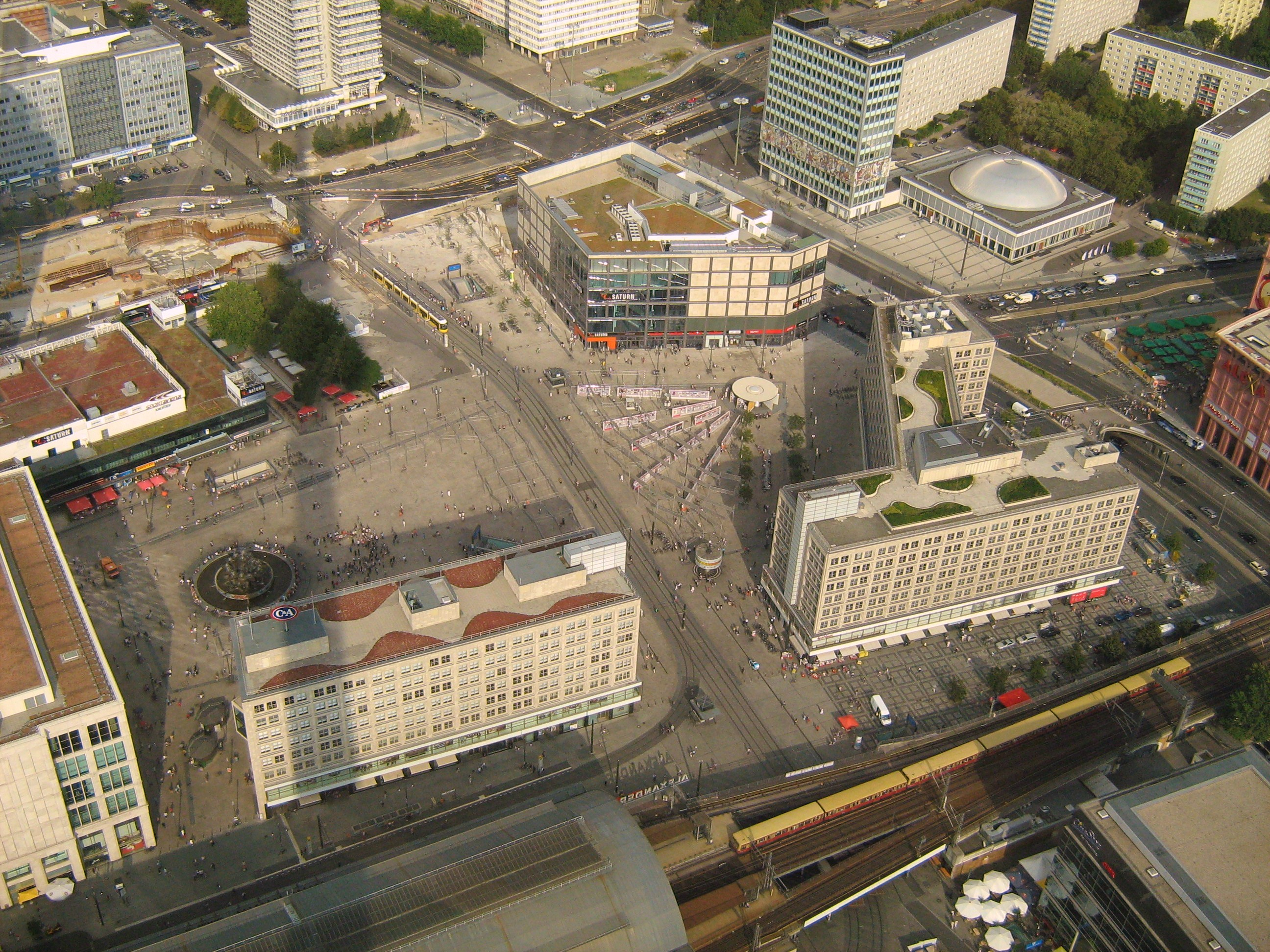 Alexanderplatz in Berlin 2009. Sicht vom Fernsehturm